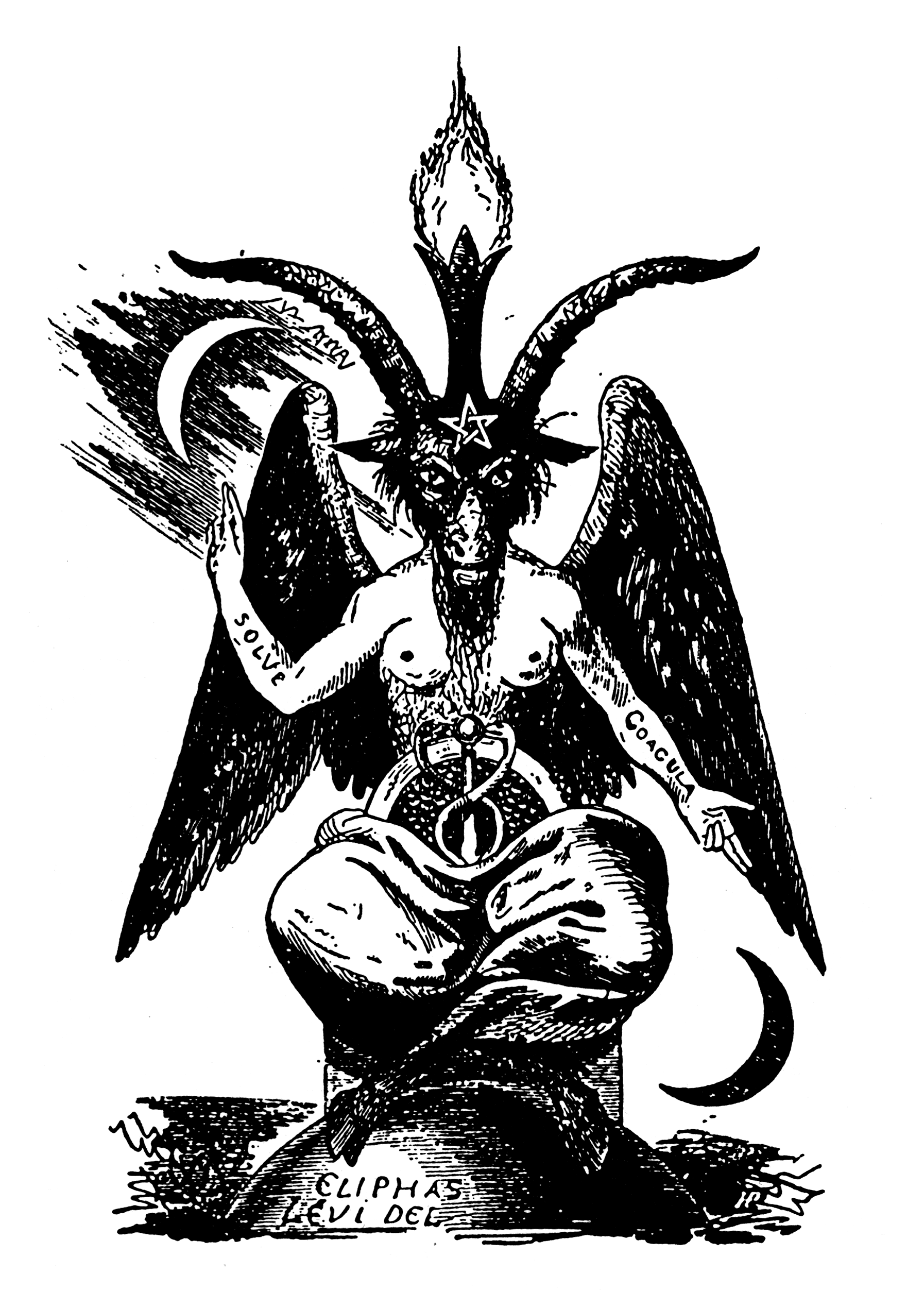 Der Dämon Baphomet als Verkörperung einer dualistischen Weltordnung. Zeichnung von Eliphas Lévi. Stanislas de Guaita. Le Serpent de la Genèse: Le Temple de Satan. Paris: Librairie du Merveilleux, 1891.